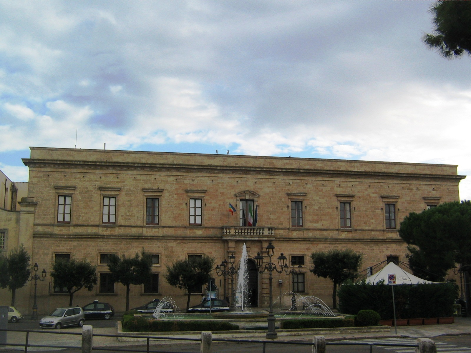 Palazzo dei Domenicani Casarano